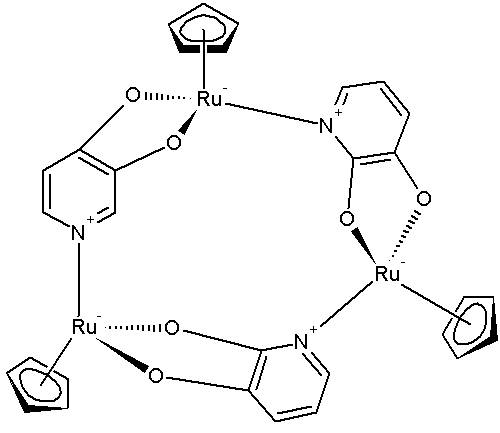 Un trímero de Ru, que sirve para secuestrar iones Li+